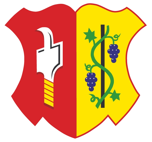 Znak obce Vlčnov